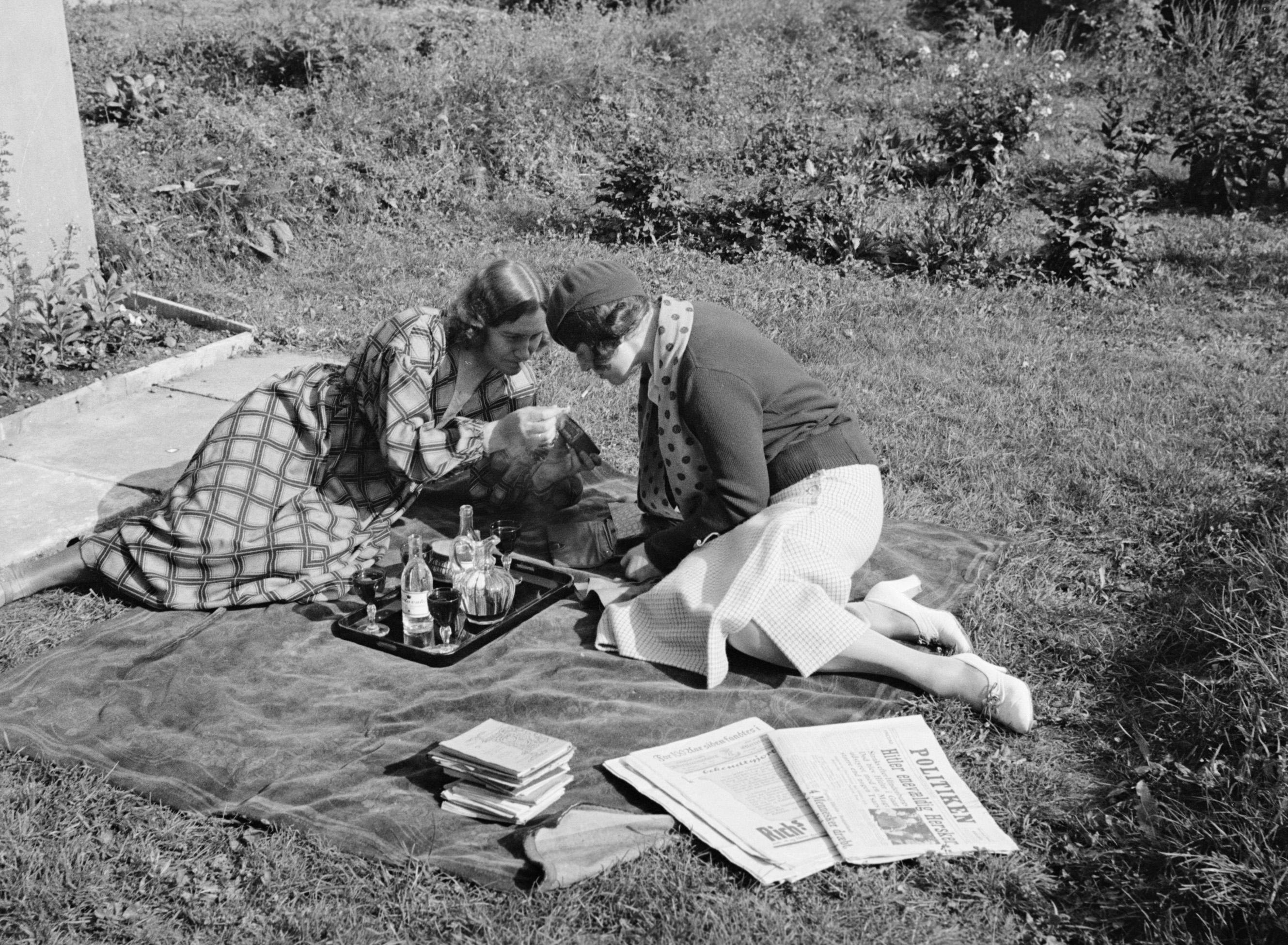 Een ongedwongen onderonsje tussen de schilderes Kristín Jónsdóttir (links) en de journaliste Anita Joachim (rechts). In het gras ligt een exemplaar van de Deense krant Politiken met op de voorpagina een artikel onder de titel "Hitler alleenheerser", IJsland, 1934.